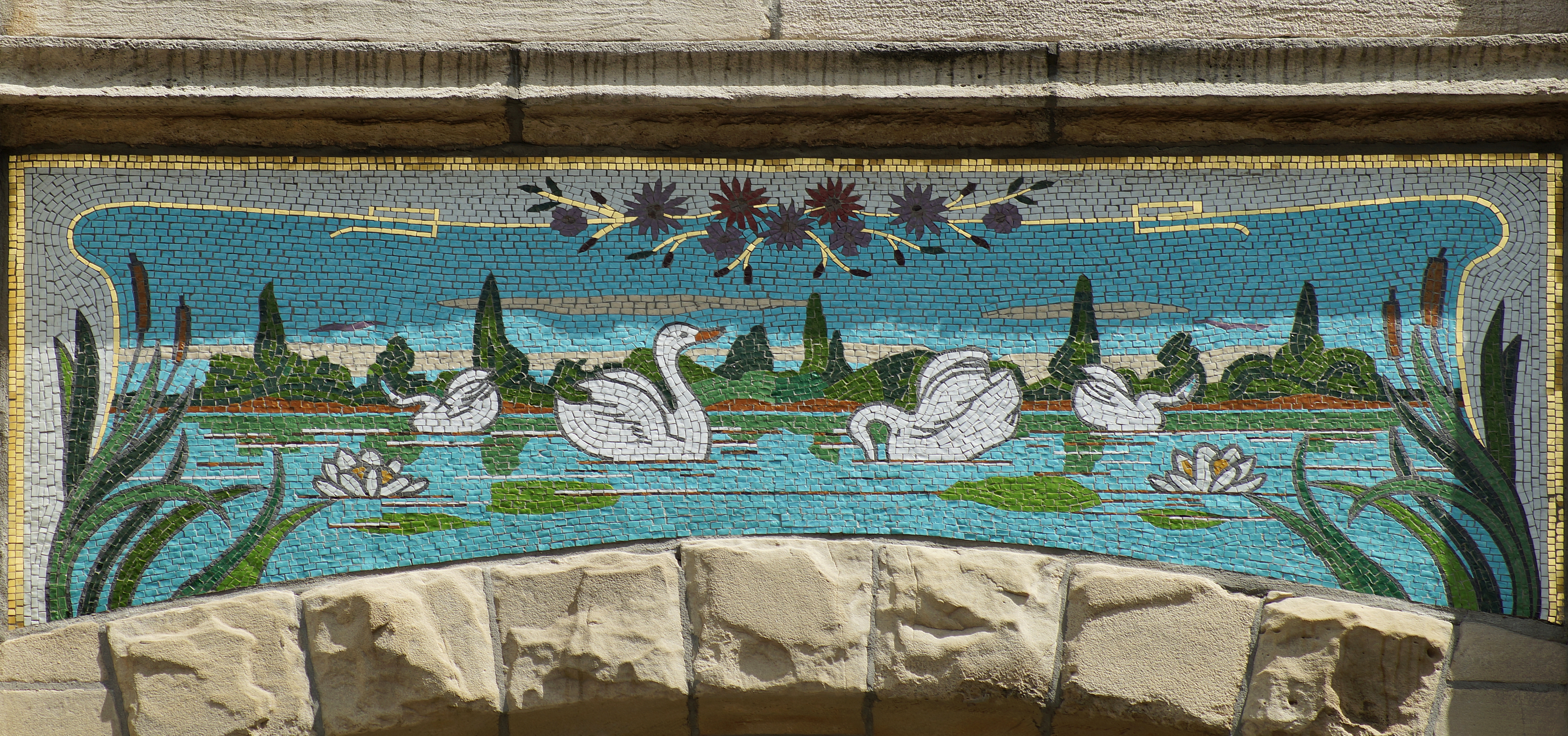 Oeuvre van architect Jozef Baeckelmans